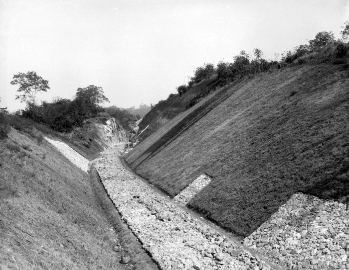 Negatief. De spoorlijn voor het traject Malang-Blitar wordt ingegraven.. Ingraving van de spoorlijn Malang-Blitar op Java, bij Soember Poetjoeng